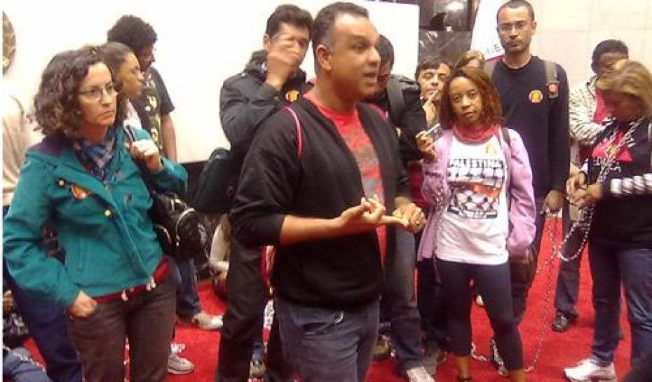 Sindicalistas fazem greve de fome Sind-UTE